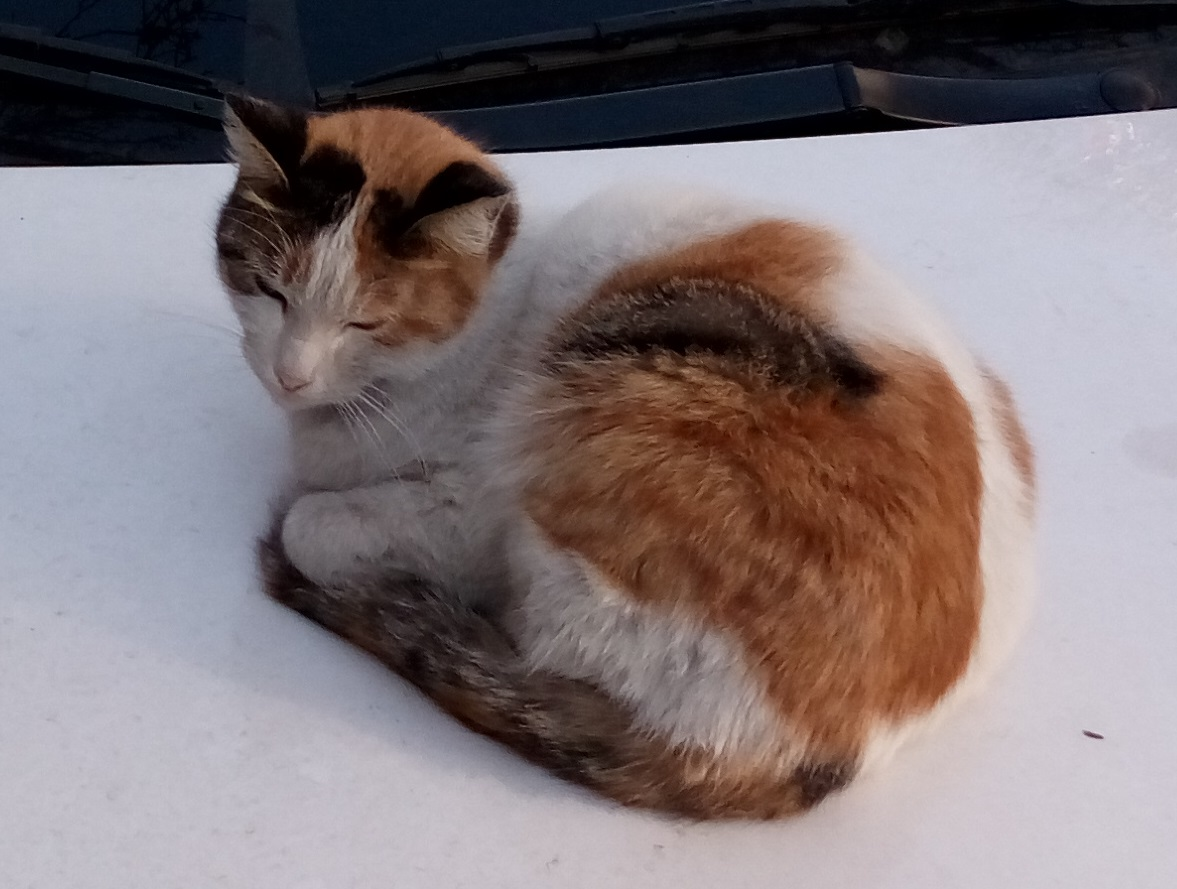 گربه ایرانی